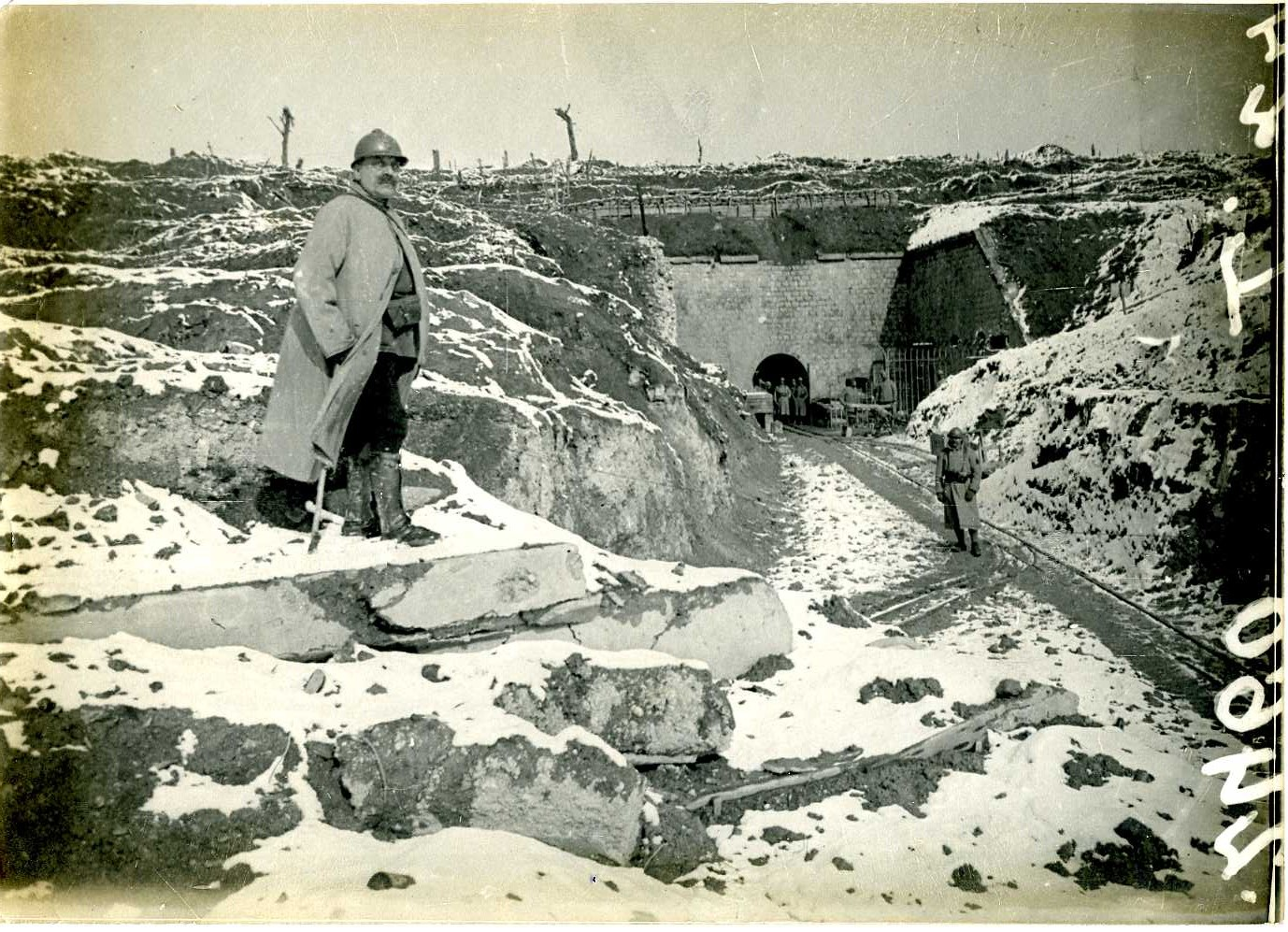 FRAD063-241 Prosper Joseph Firmin LAGRANGE Documents about Prosper Joseph Firmin LAGRANGE Militaire de carrière en Algérie, fils de Bernard LAGRANGE et Françoise DAUPHIN. Grand-oncle du déposant. Classe 1883. Commandant, chef de bataillon du 33e régiment d'infanterie, ayant eu sous ses ordres le capitaine Charles De Gaulle. Fait prisonnier par les Allemands en 1916 à Douaumont (département de la Meuse, France) puis envoyé à Vöhrenbach, en Allemagne. Nommé Officier de la Légion d'honneur le 13/07/1915. Une photographie de Prosper Lagrange, une lettre à sa soeur après sa captivité, une citation, une lettre de Charles De Gaulle et une photographie de Douaumont.